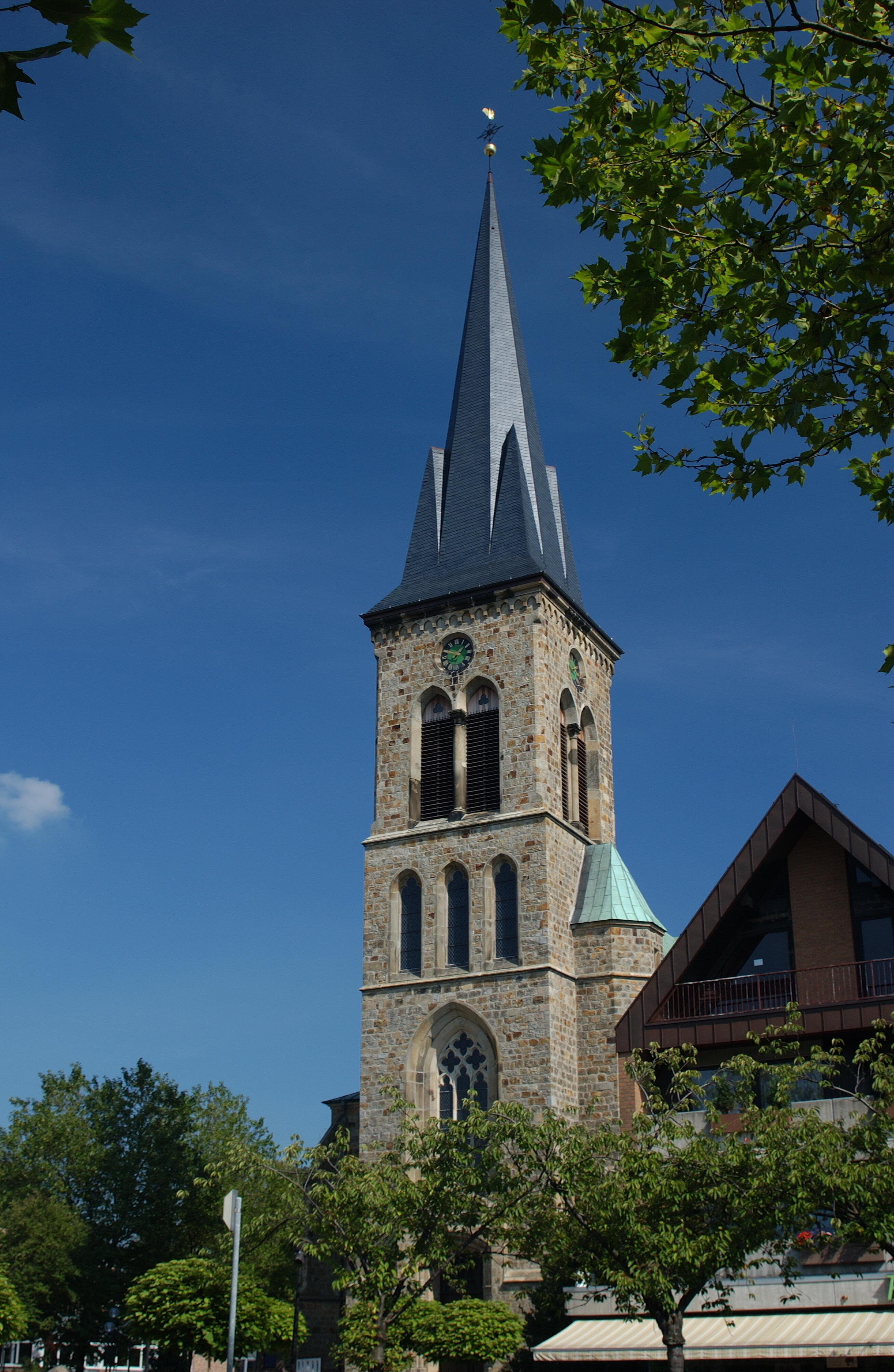 Kirche St. Cyriakus Salzbergen Frontansicht